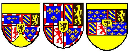 Eigen tekening Robert Prummel